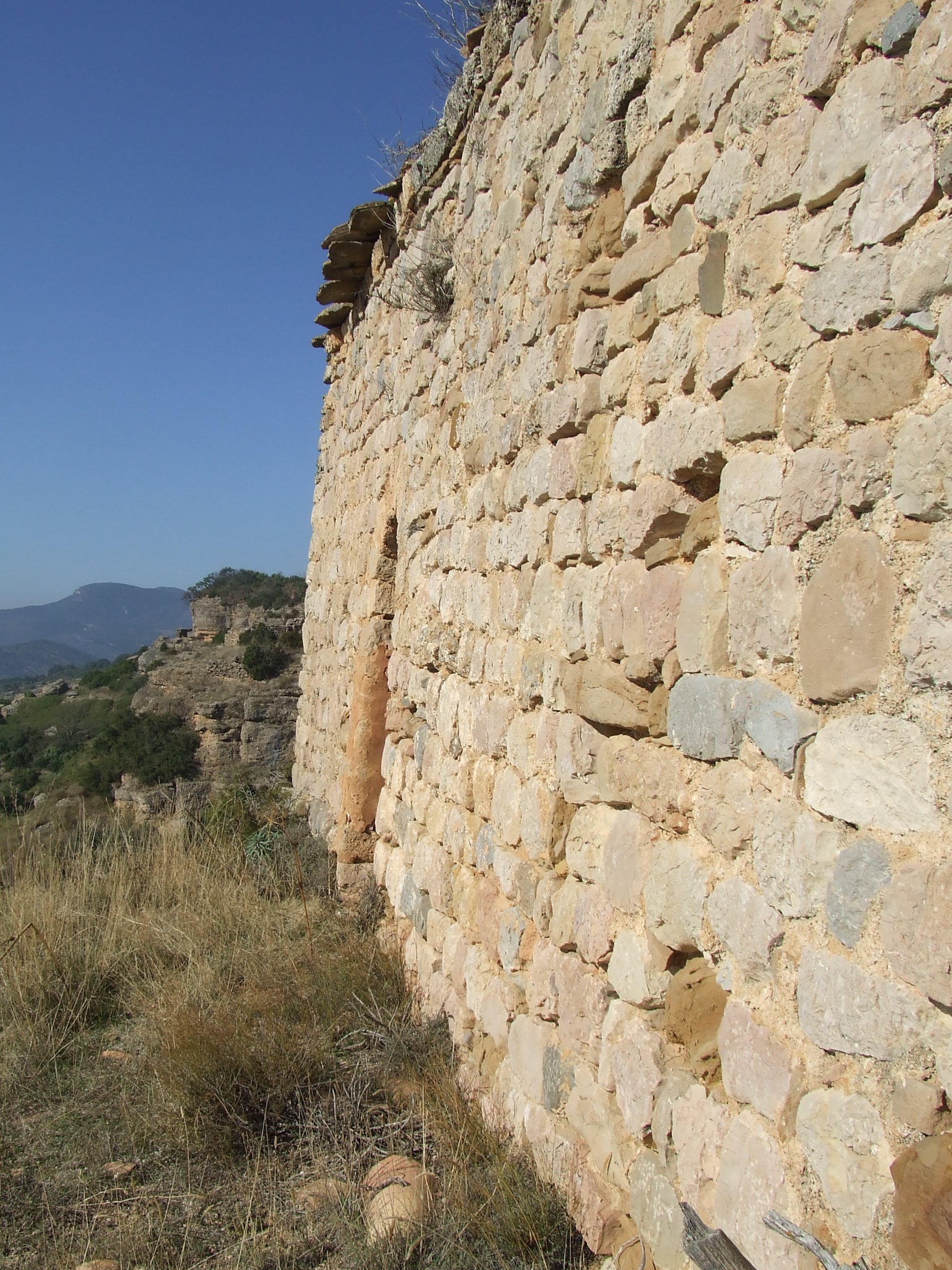 Església de Santa Anna de Montadó (Benavent de la Conca, Isona i Conca Dellà, Pallars Jussà)